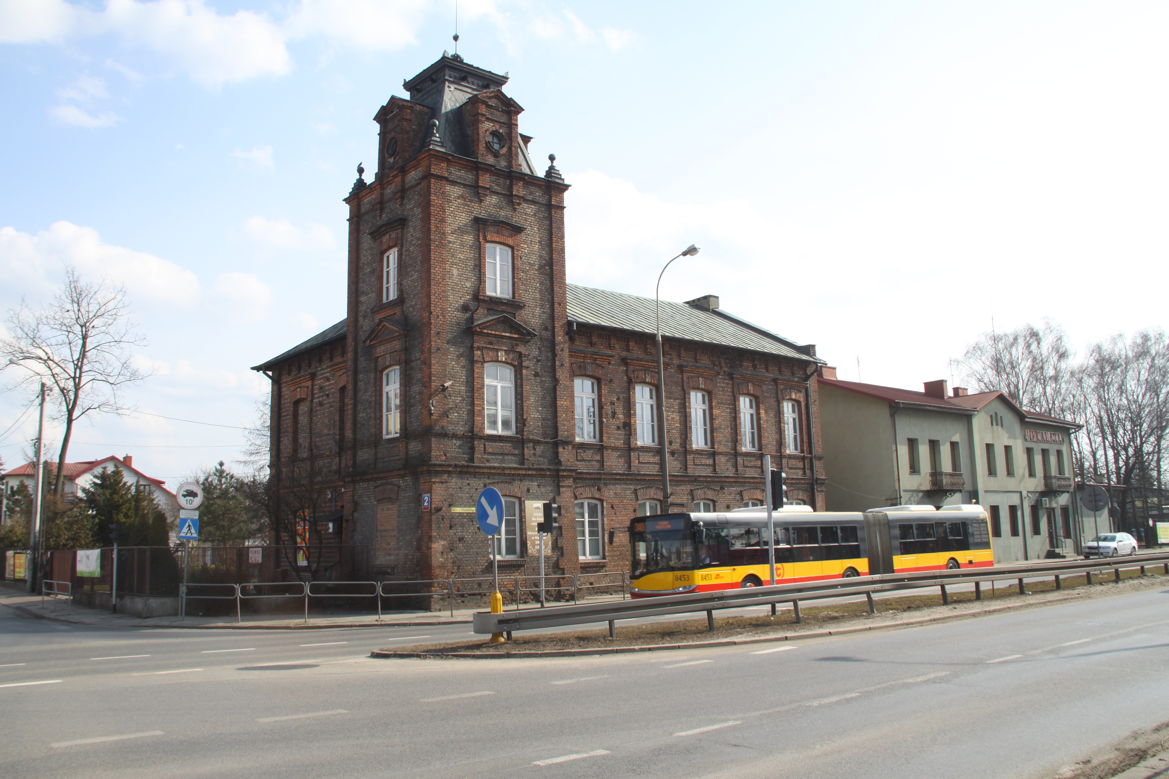 Marecki Ośrodek Kultury oraz autobus Solaris Urbino 18 (#8453) w Markach 03.1999.